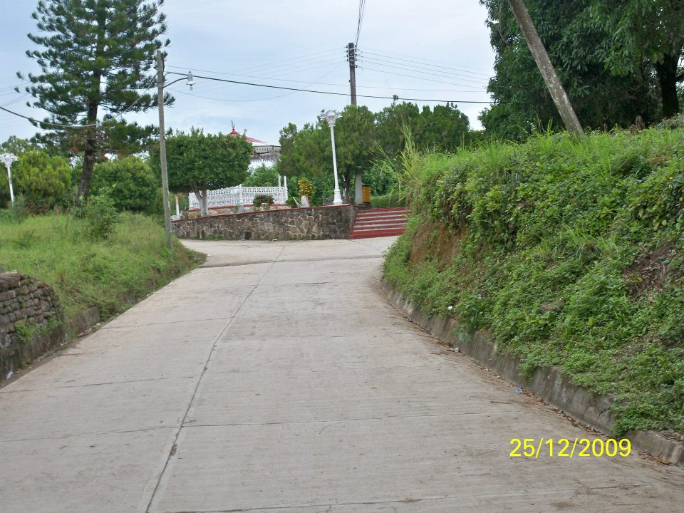 Calle principal de la localidad